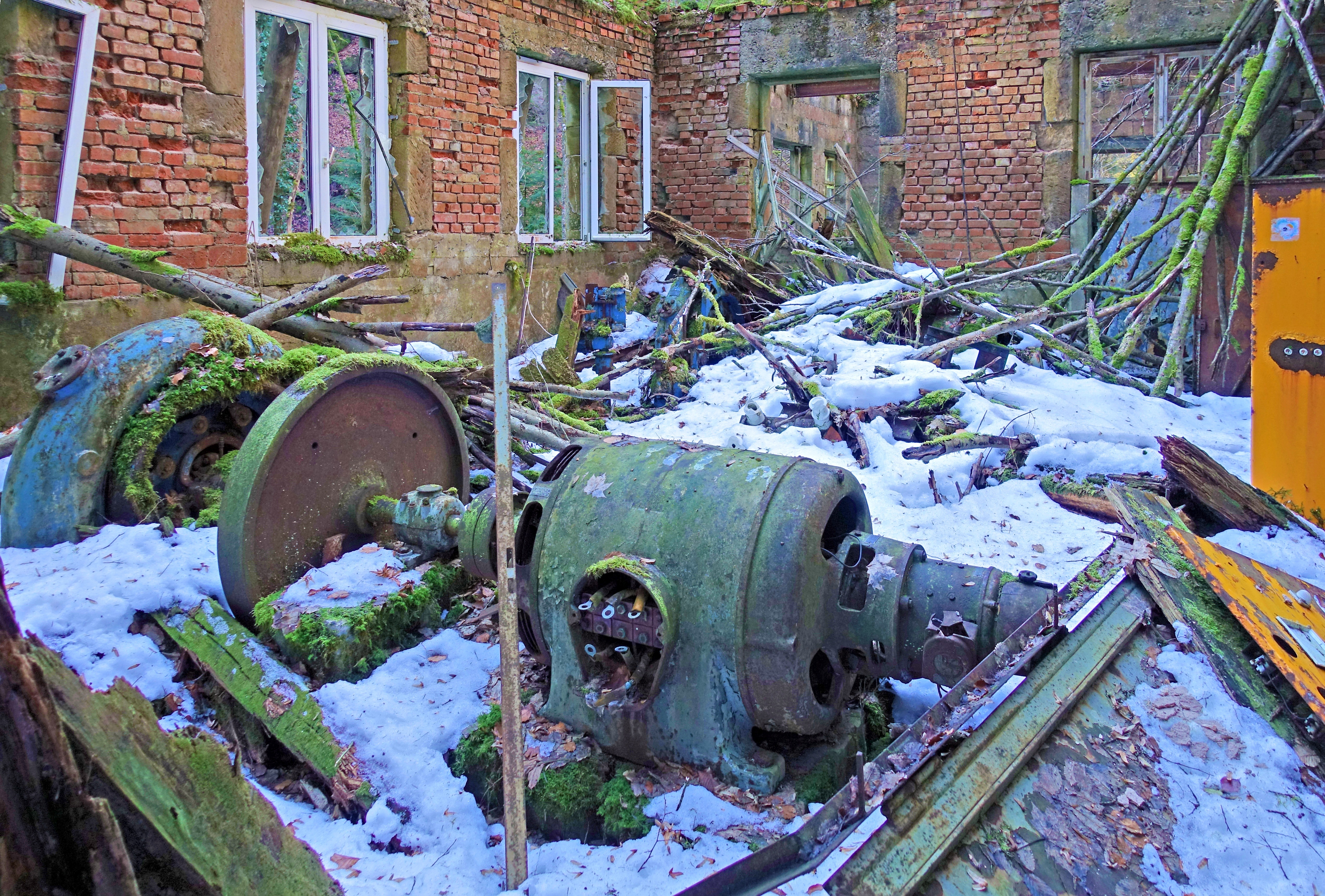 Ehemaliges Elektrizitätswerk von Bauknecht im Wieslauftal, Klingenmühle, fotografiert am 14.2.2019. Von links: Francis-Turbine, Schwungrad, Generator, Erregermaschine